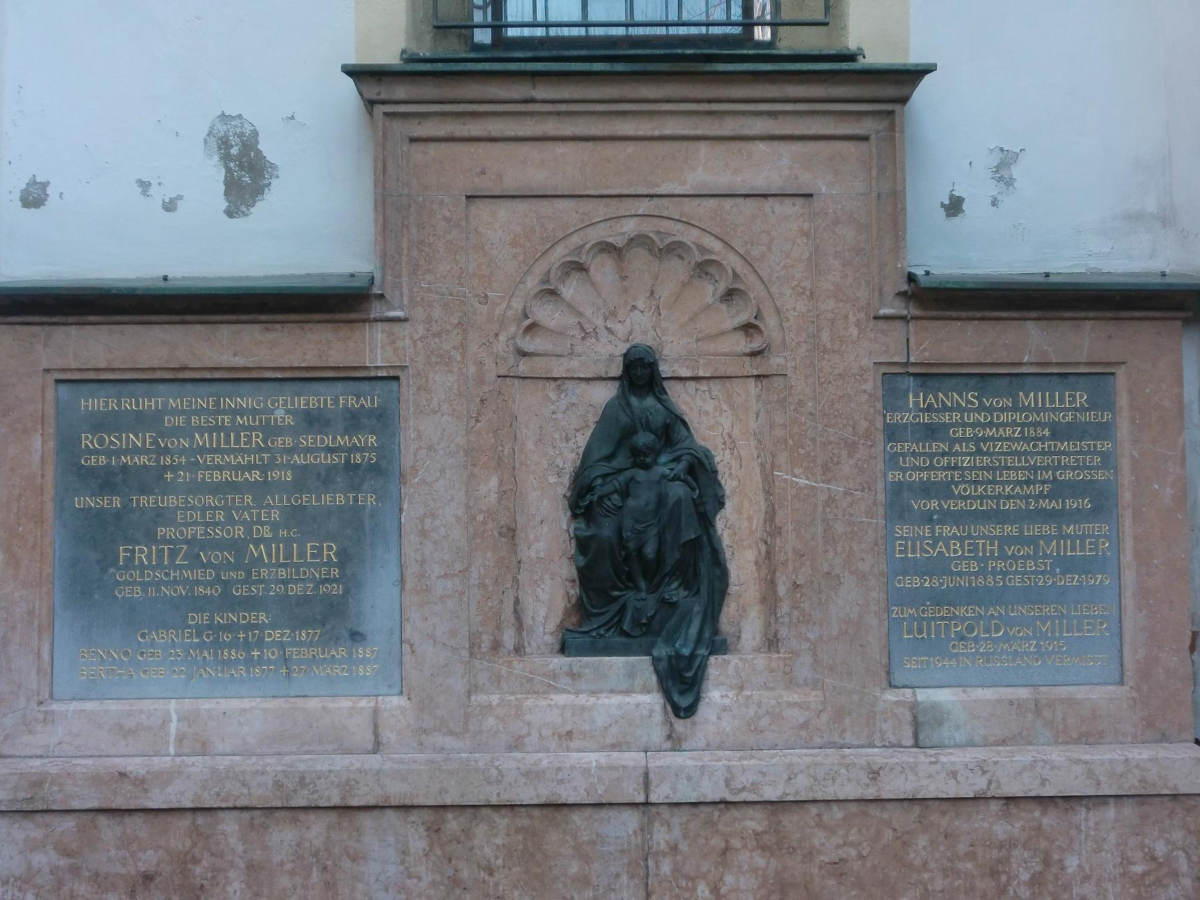 Fritz von Miller, Grabstätte auf dem Winthirfriedhof in München.